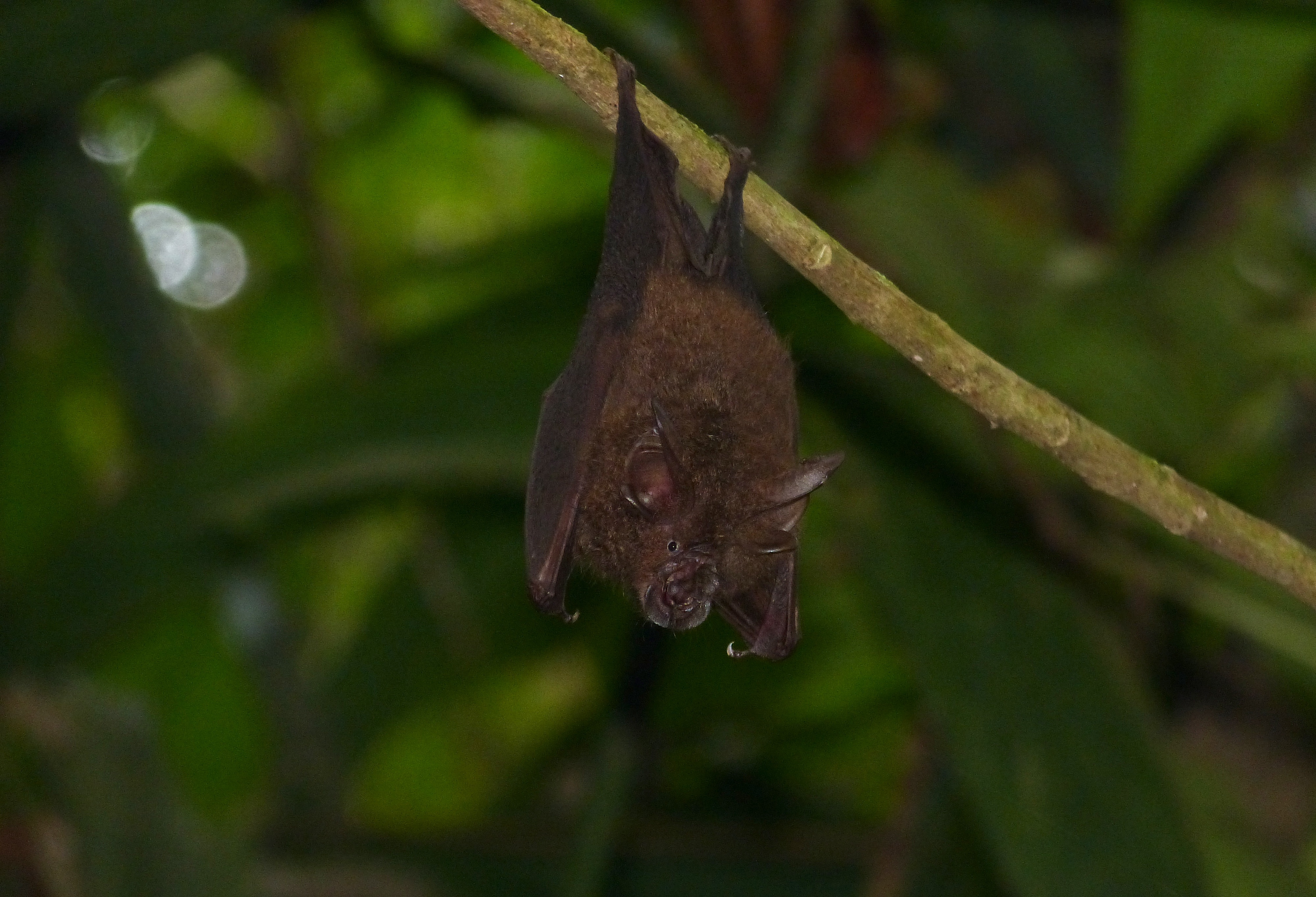 Taman Negara NP, Pahang, MALAYSIA